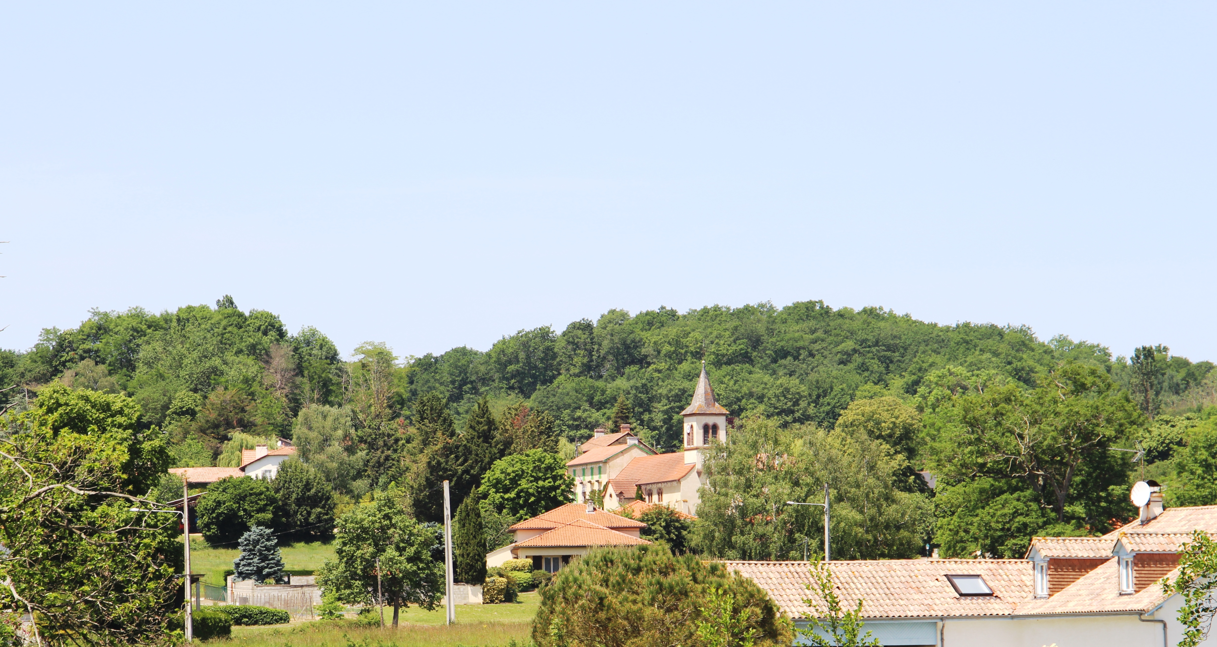 Louit (Hautes-Pyrénées)